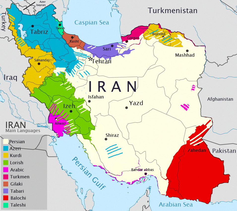 ترکیب زبانی ایران